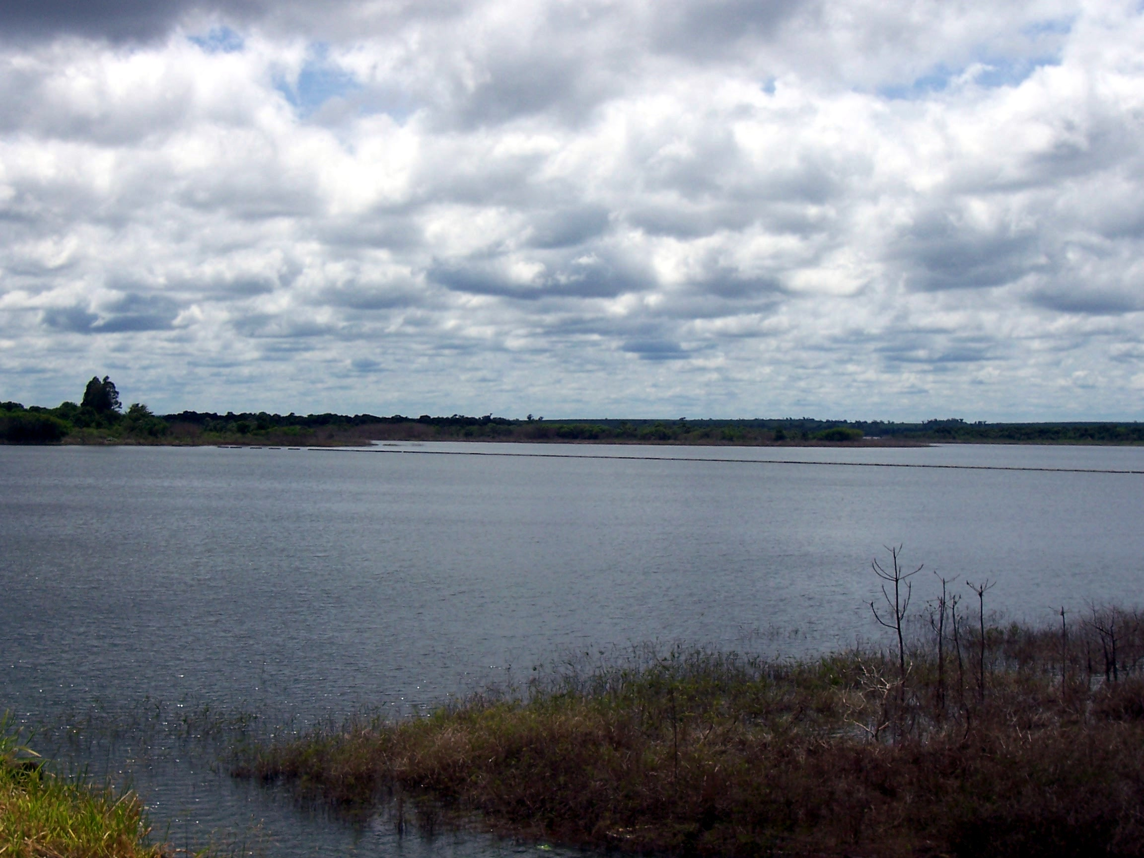 Lago artificial formado por la represa Hidroeléctrica de Urugua-í en la provincia de Misiones (Argentina).